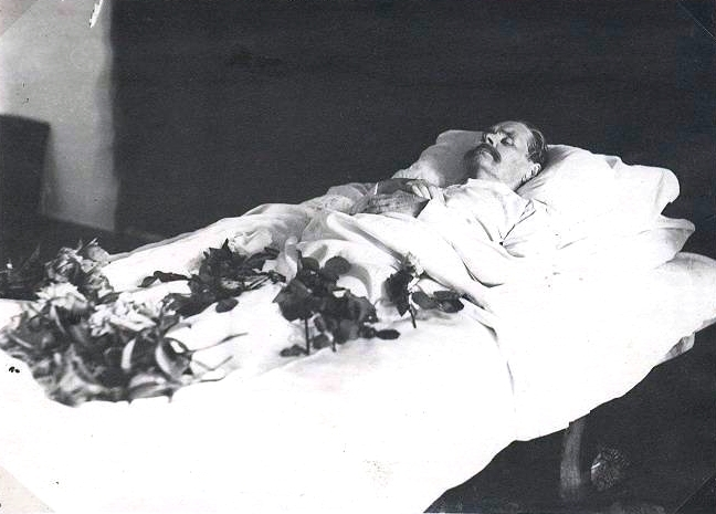 Похороны Максима Горького Дата съемки: 18 - 21 июня 1936